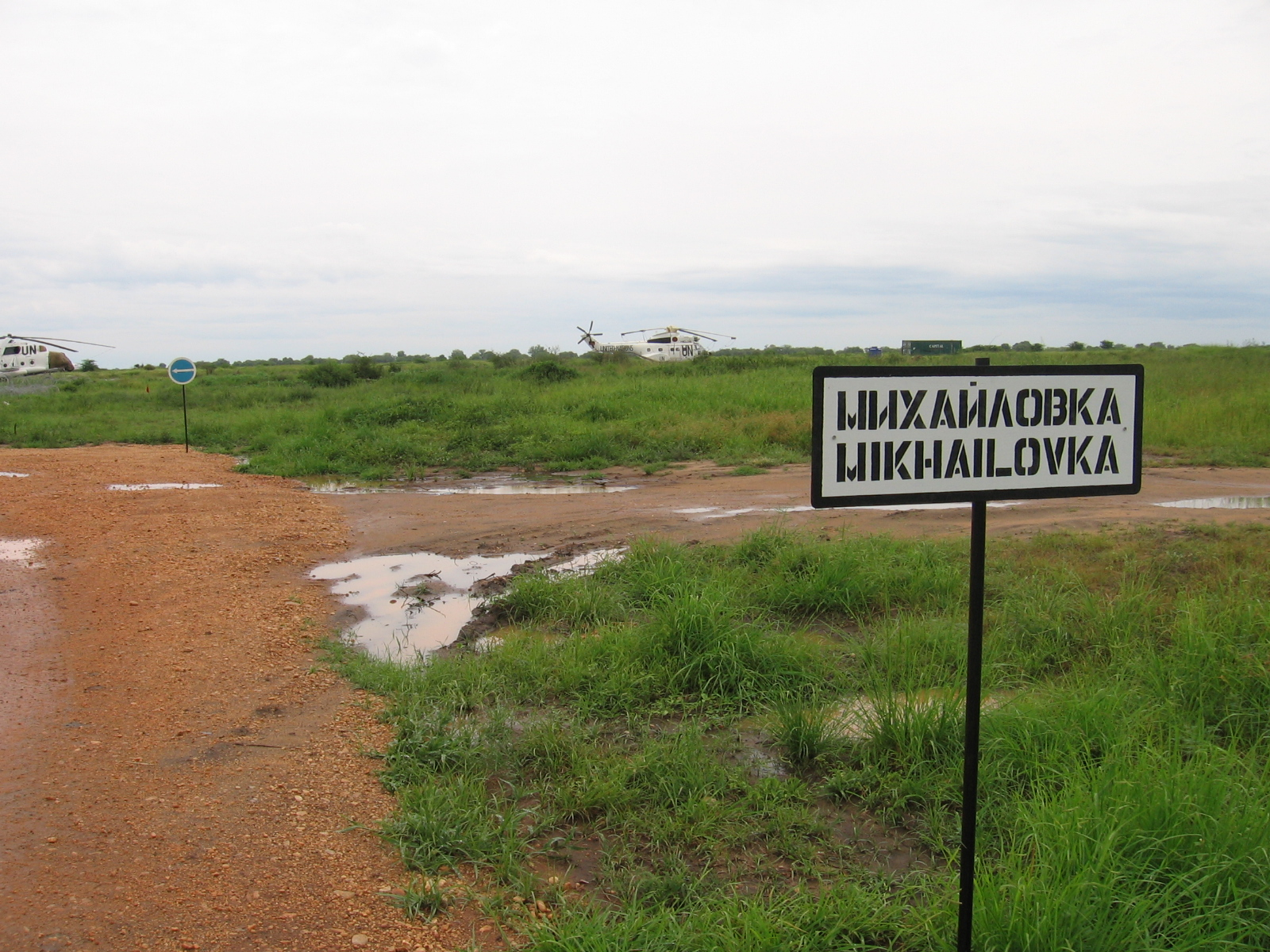 Табличка у входа в авиагруппу